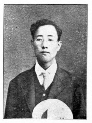 中文（台灣）: 中華民國國會議員